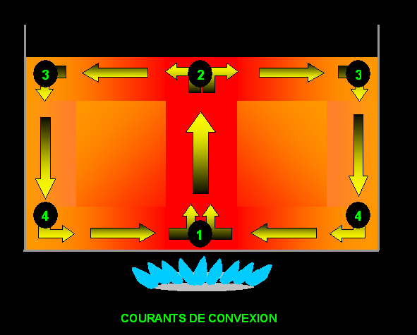 SChéma explicatif des courants de convexion dans l'eau convection